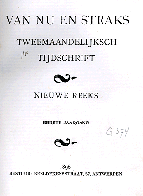 Couverture de la revue flamande d'expression néerlandaise "Van Nu en Straks". Deuxième série, année 1896.